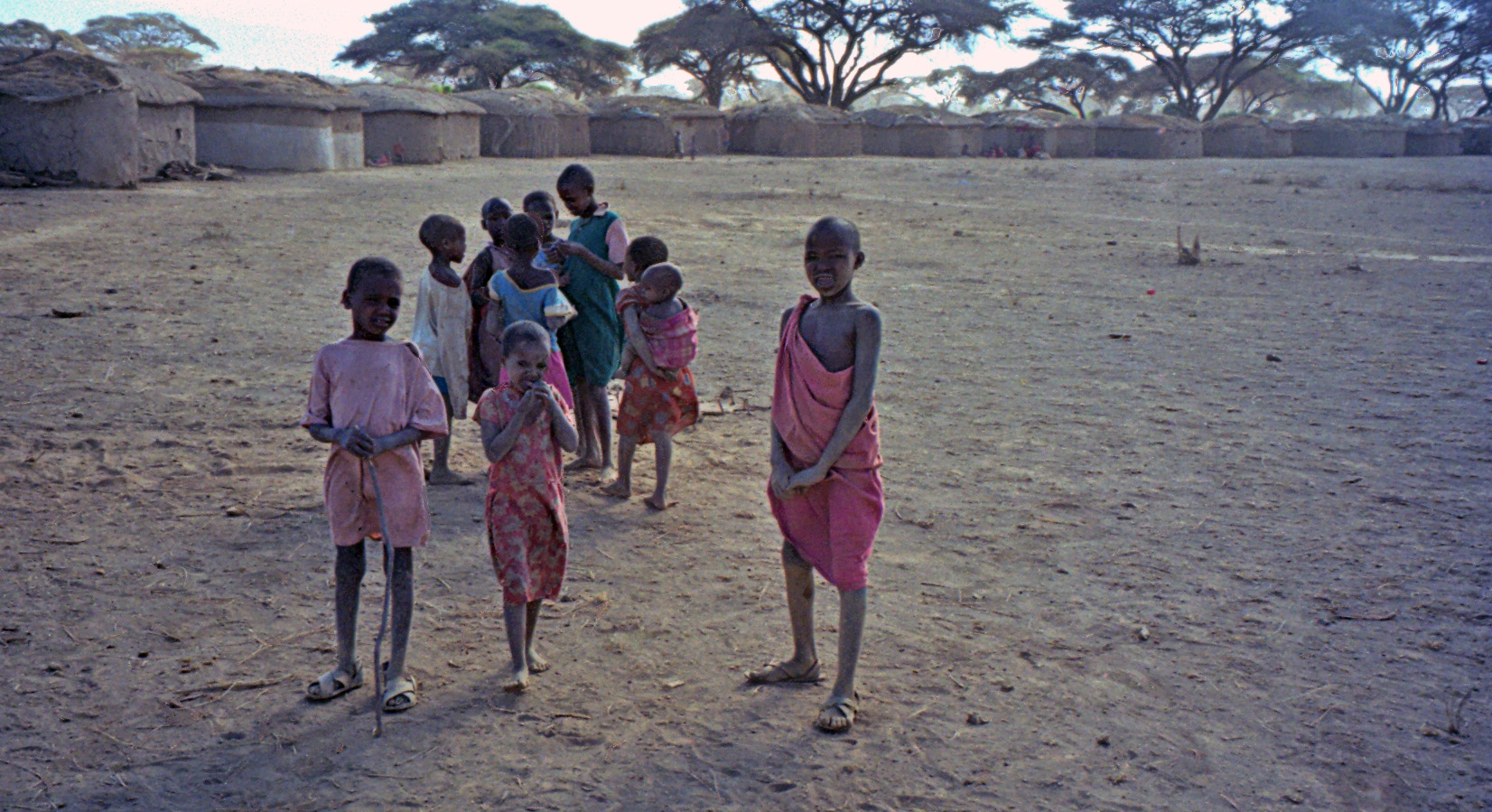 Maasai children, Amboseli National Park, Kenya, 1993.